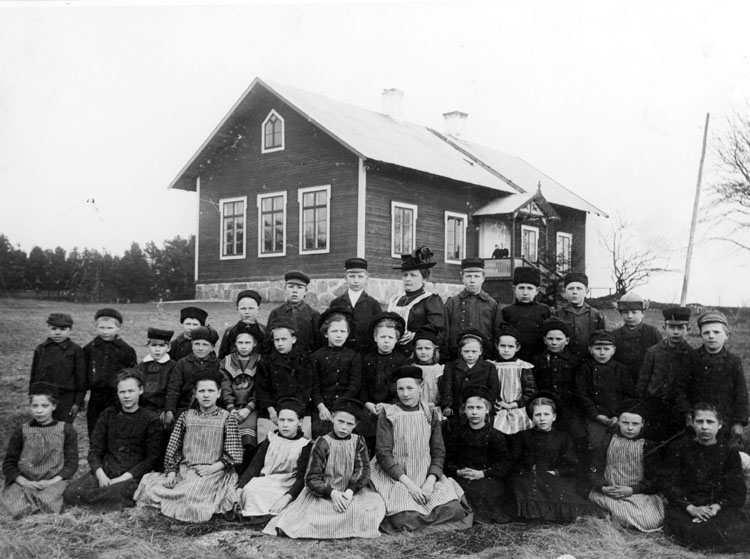 Långbacka/Veddesta skola, 1908-1909. Lärare: Anna Larsson. Bildnr 02292. Fotograf och förvärvat från: Alb. Edström. Främre raden 1:a från vänster Ingrid Andersson, dotter till Emil Andersson, stationskarl i Barkarby.